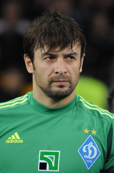 Oleksandr Shovkovskiy in Dynamo Kyiv